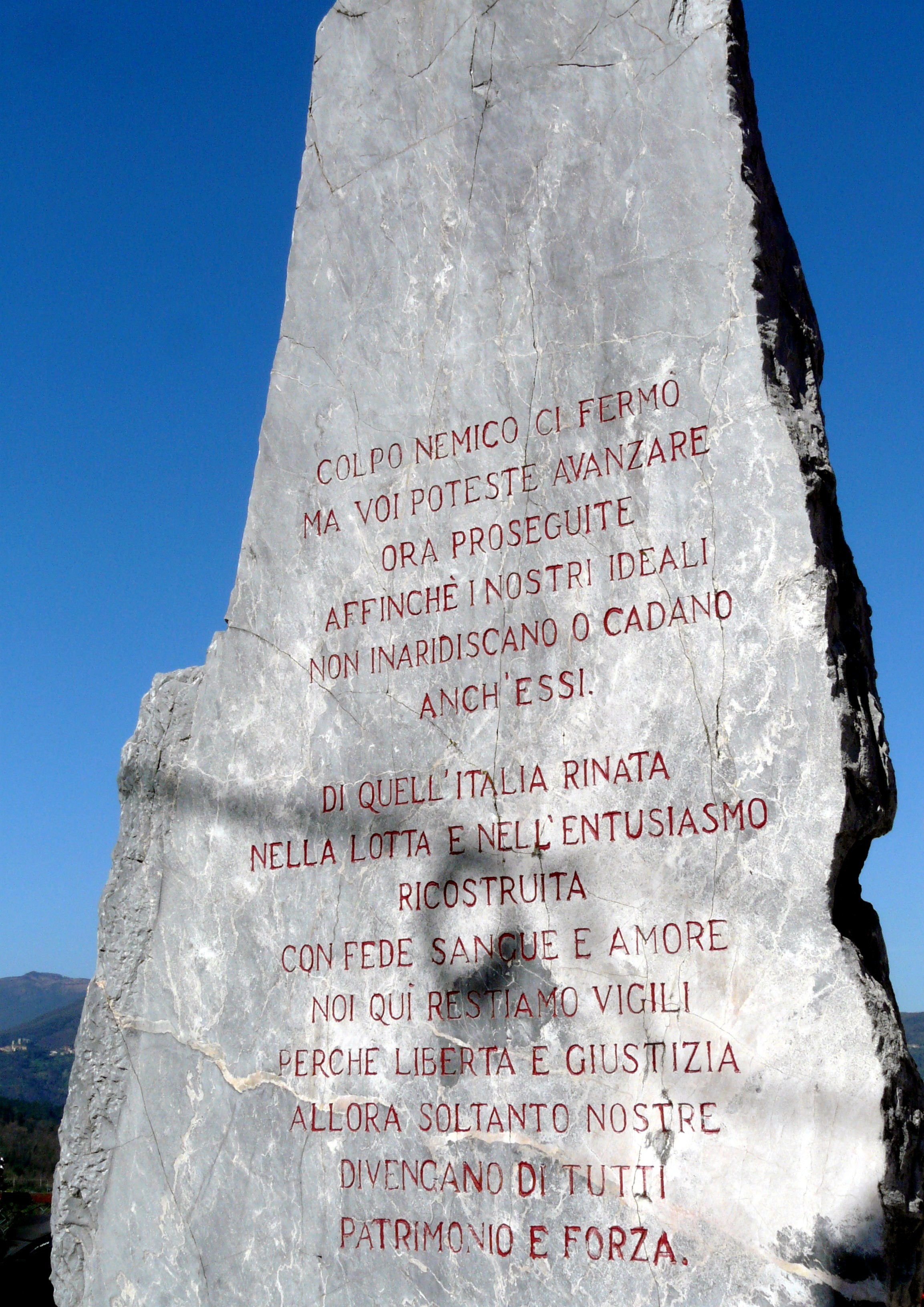 Monumento a Valeriano, Vezzano Ligure, Liguria, Italia